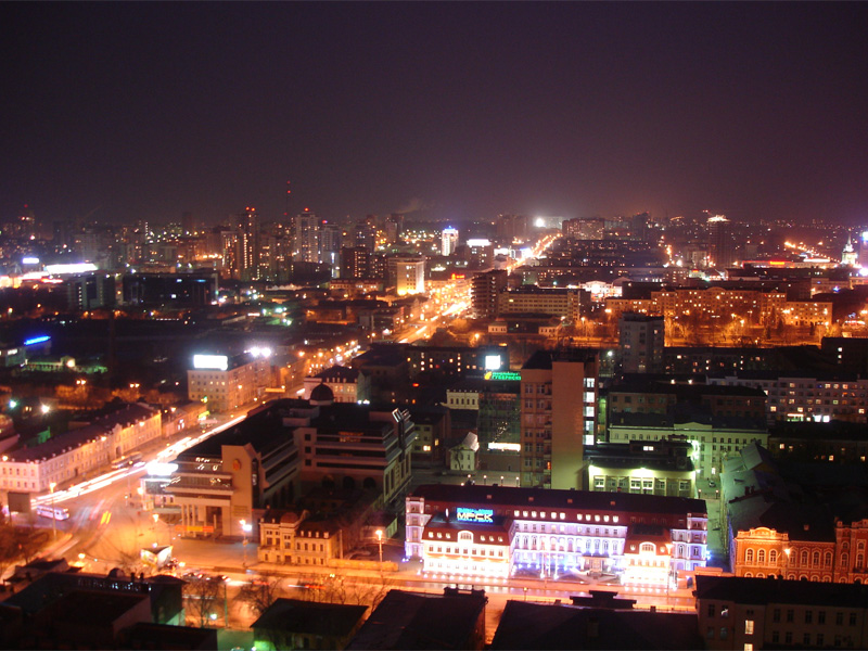 Ekaterinburg at night